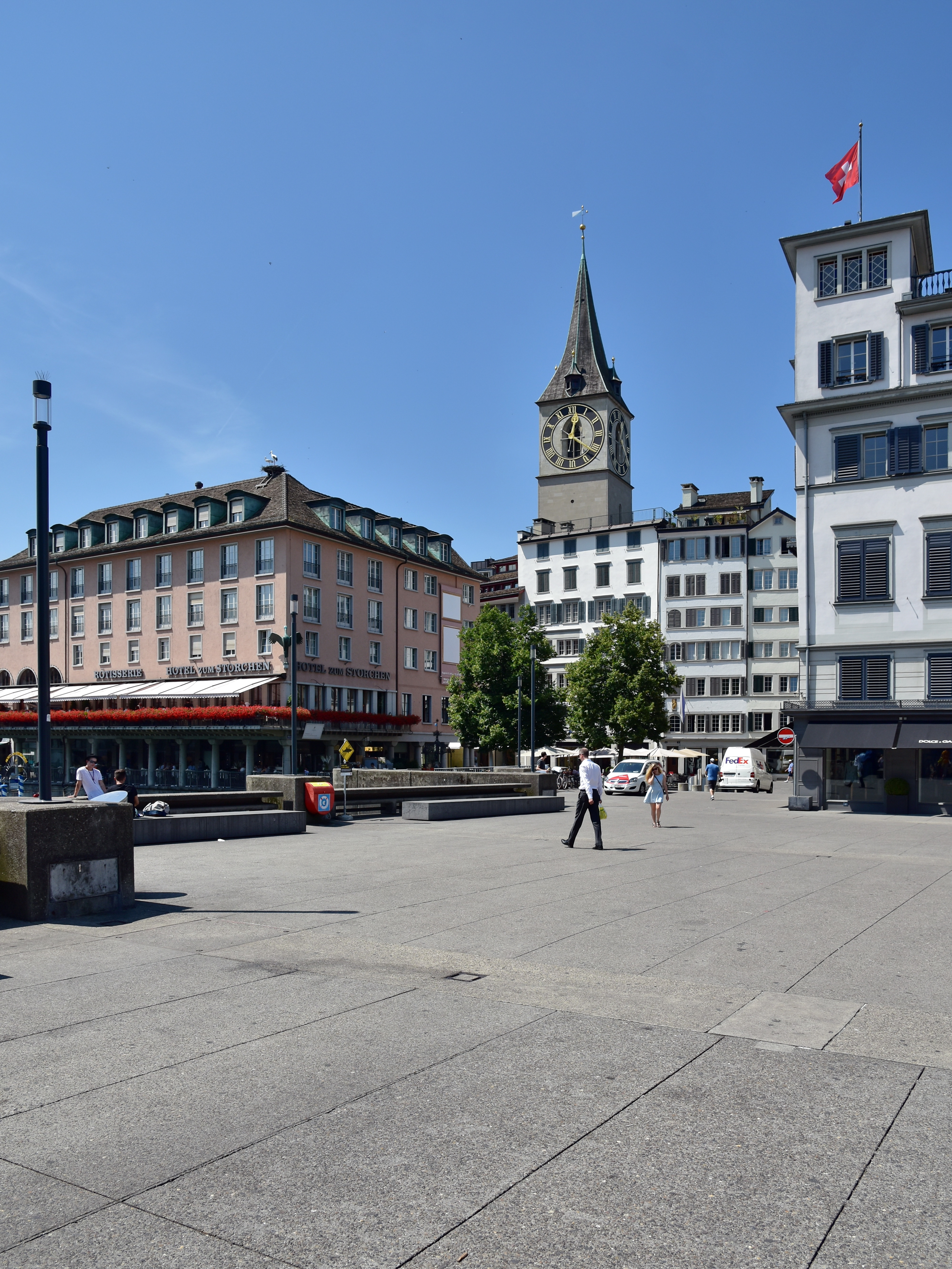 Rathausbrücke (Gmüesbrugg) and Weinplatz in Zürich (Switzerland) as seen from Limmatquai